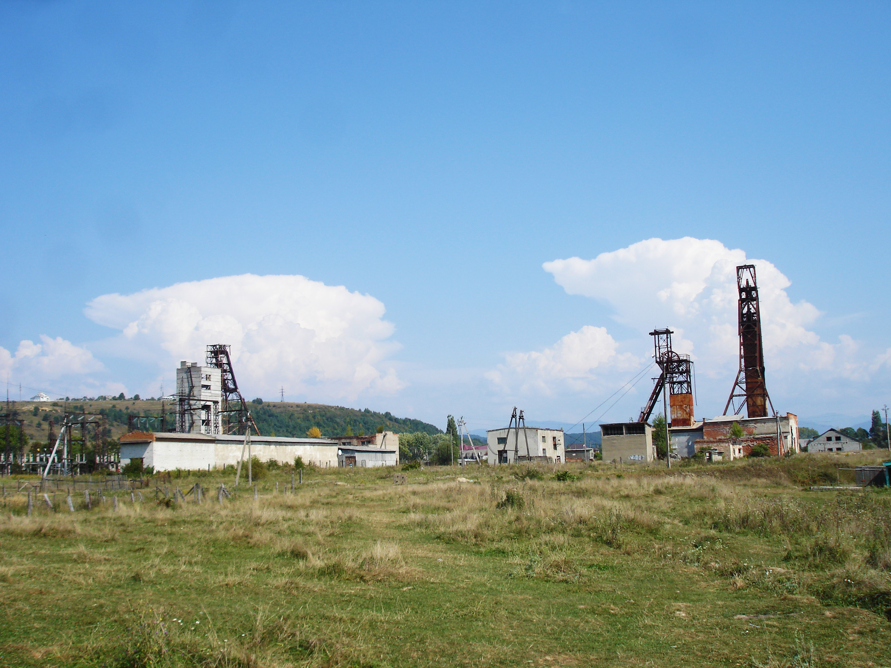 Виходи кам'яної солі на поверхню, Тячівський р-н, смт Солотвино